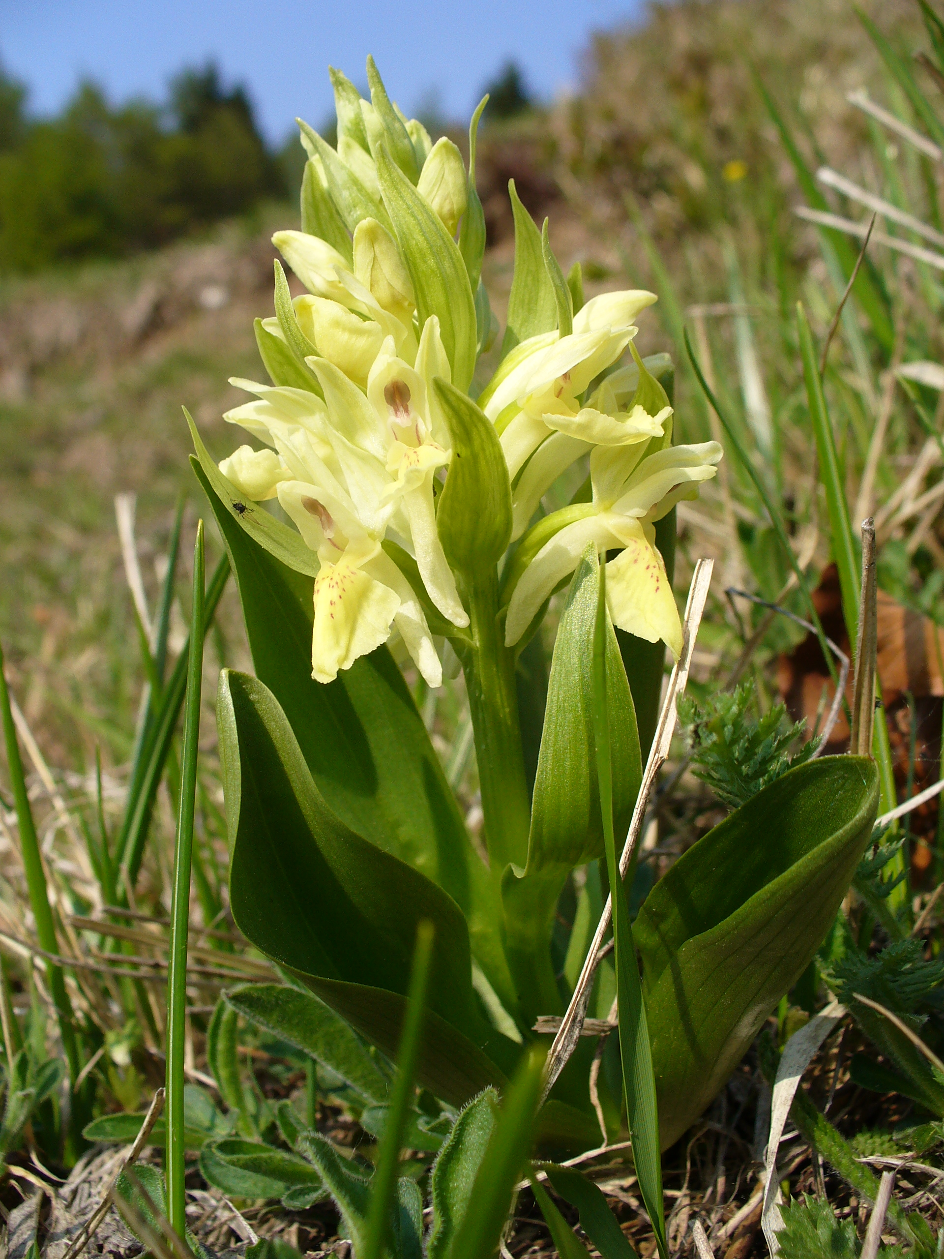 Dactylorhiza sambucina.